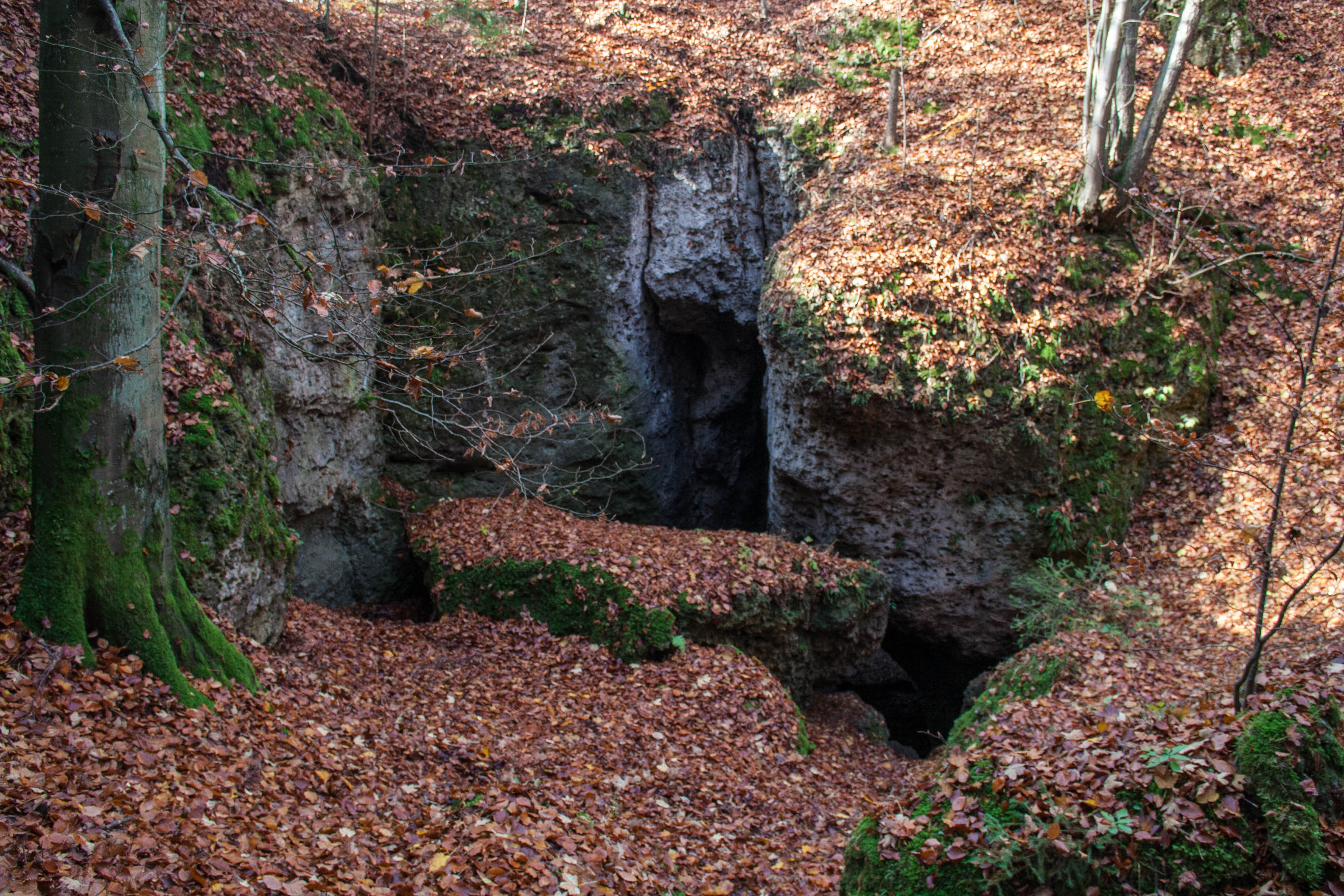 Sonnenuhr, A 32, Höhle, Königstein